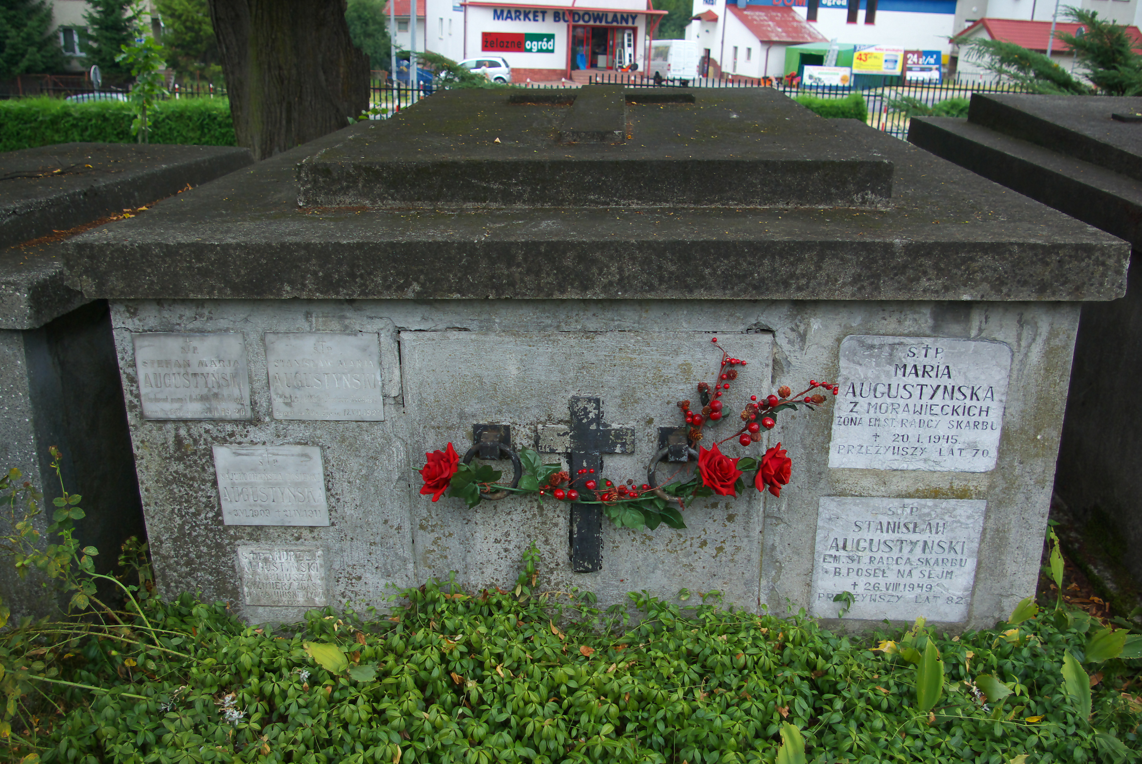 Grobowiec rodziny Augustyńskich na Cmentarzu Centralnym w Sanoku.